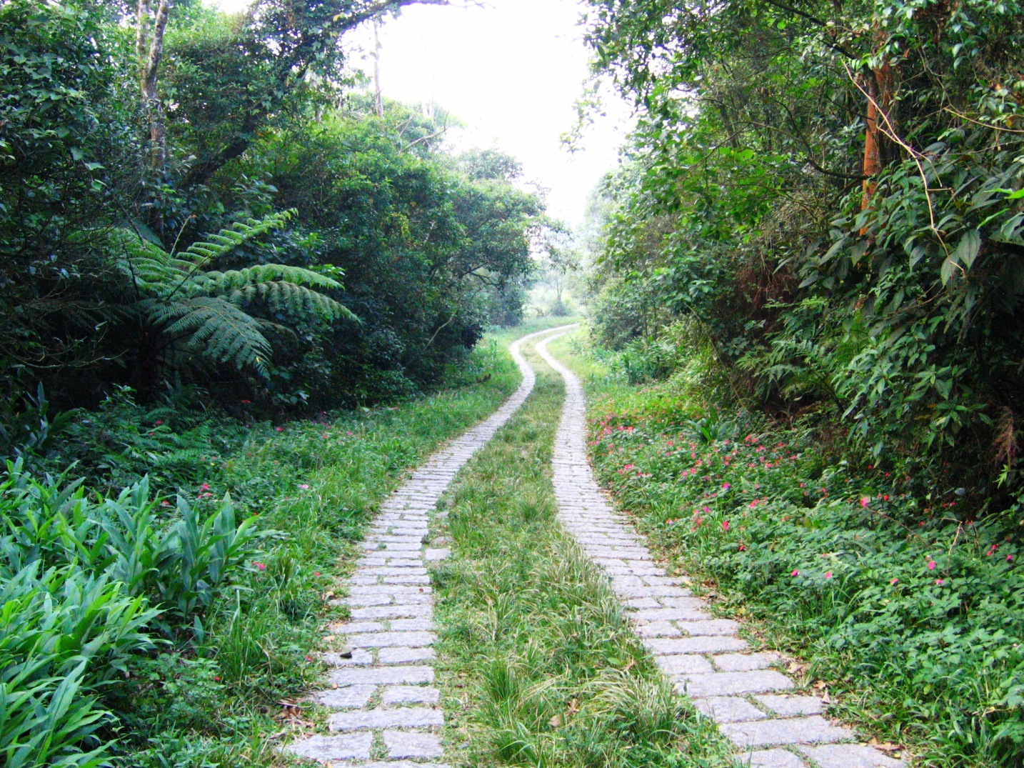 Trilha para as torres de TV